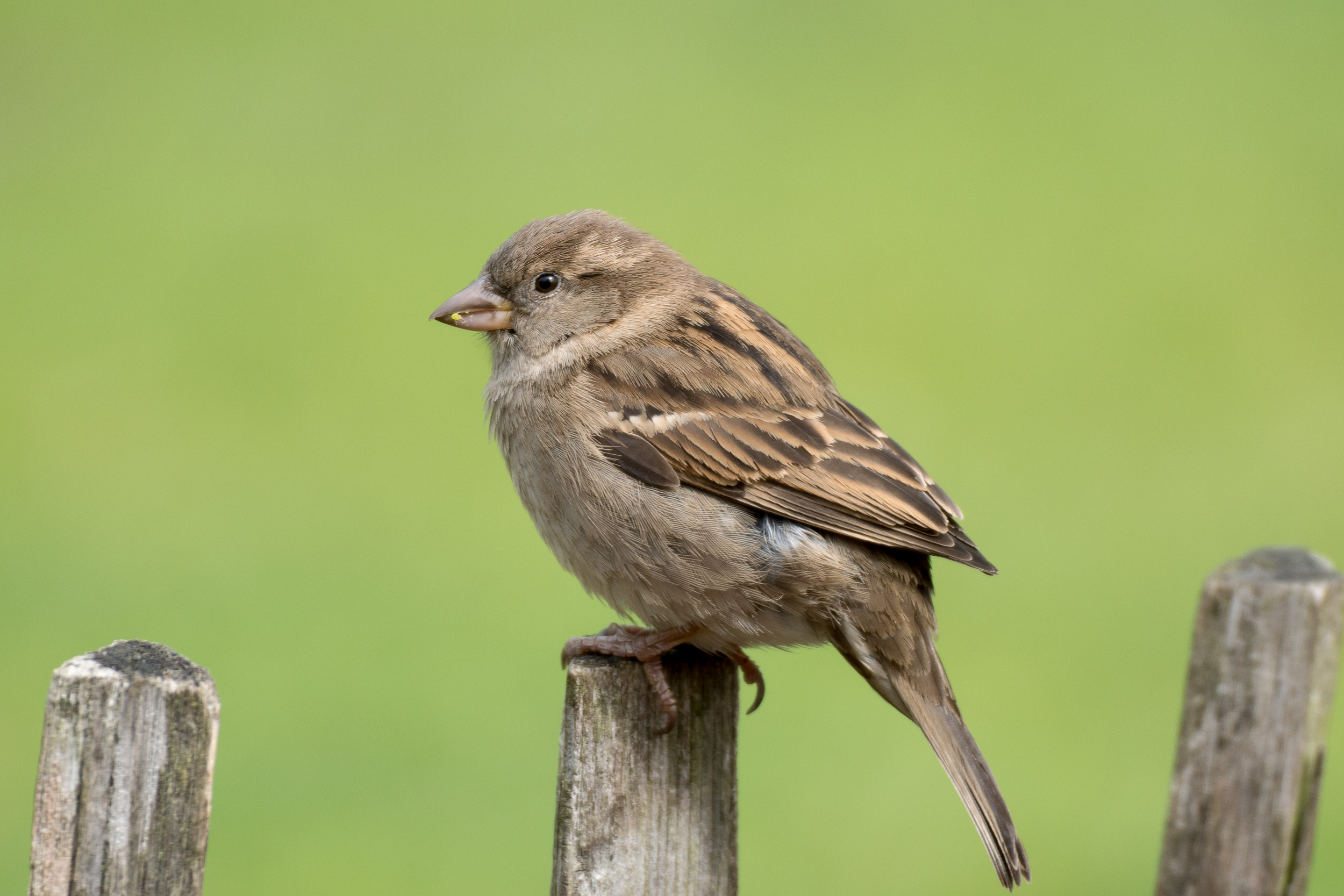 huismus, vrouw house sparrow, female